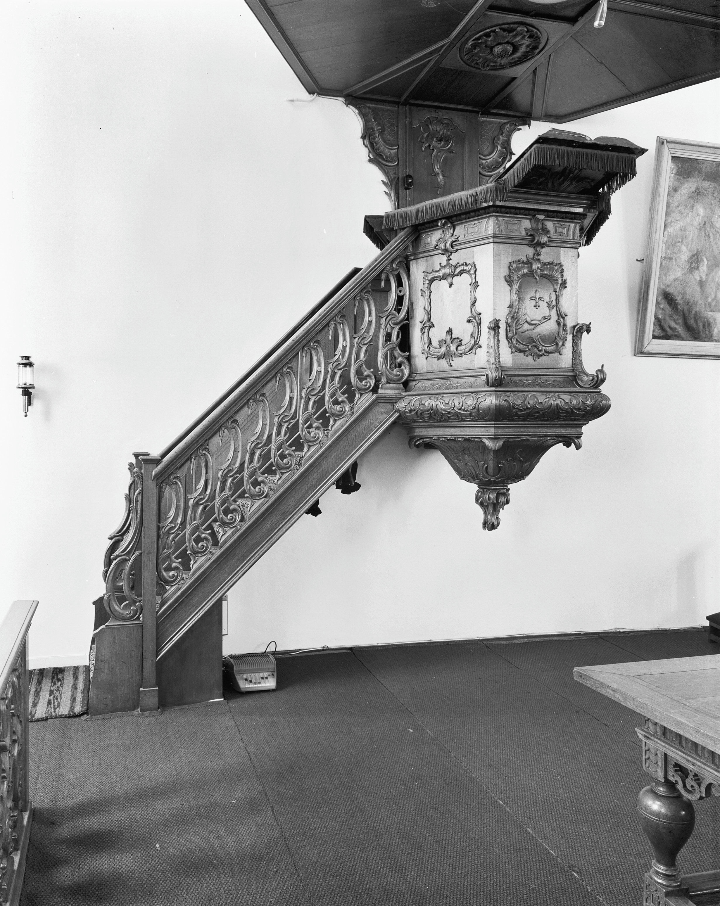 Nederlands Hervormde Kerk: preekstoel